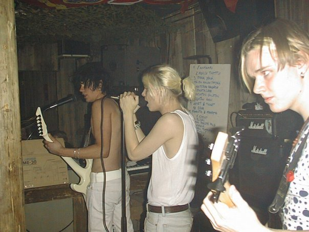 до нгт